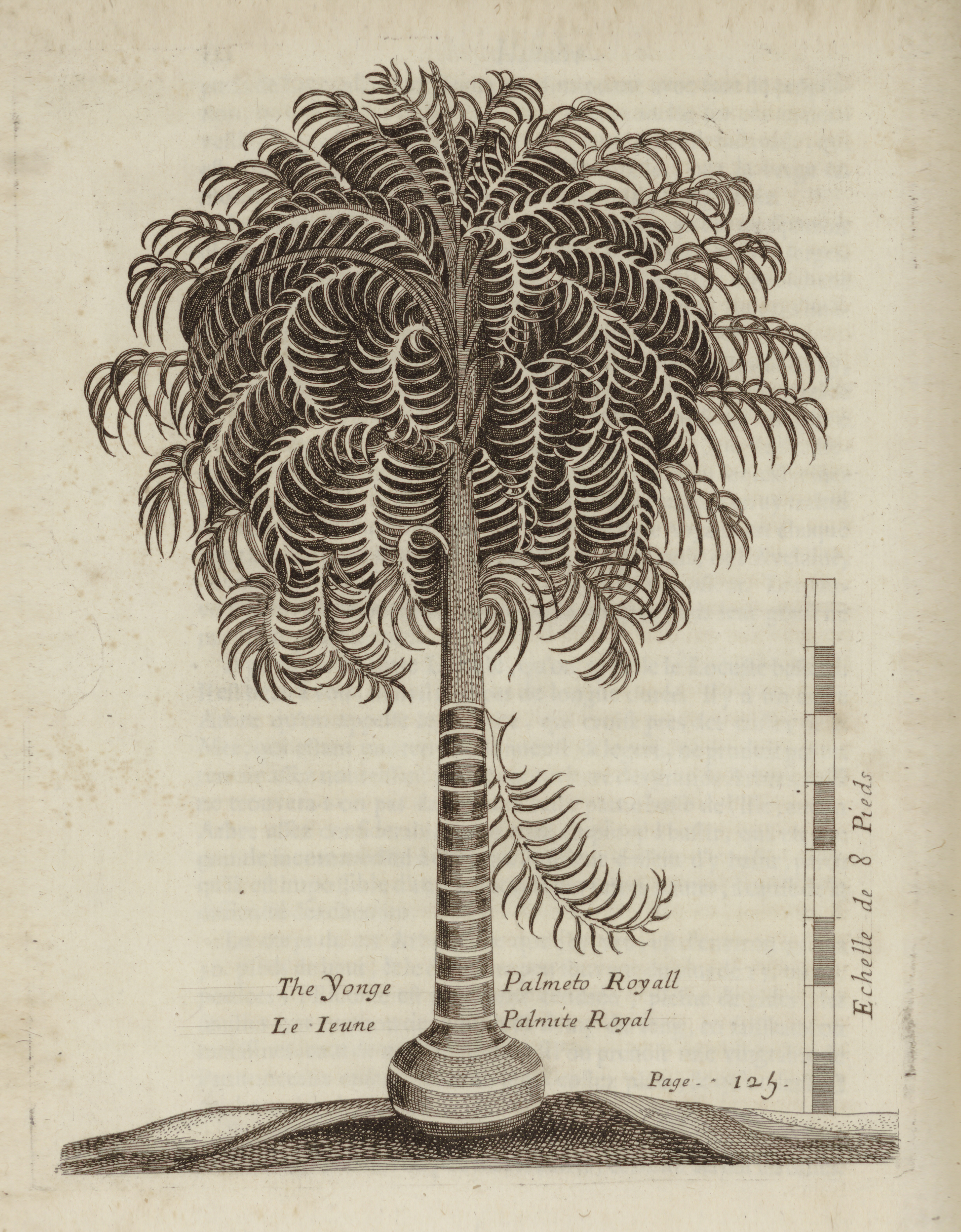 Climbing the royal palm